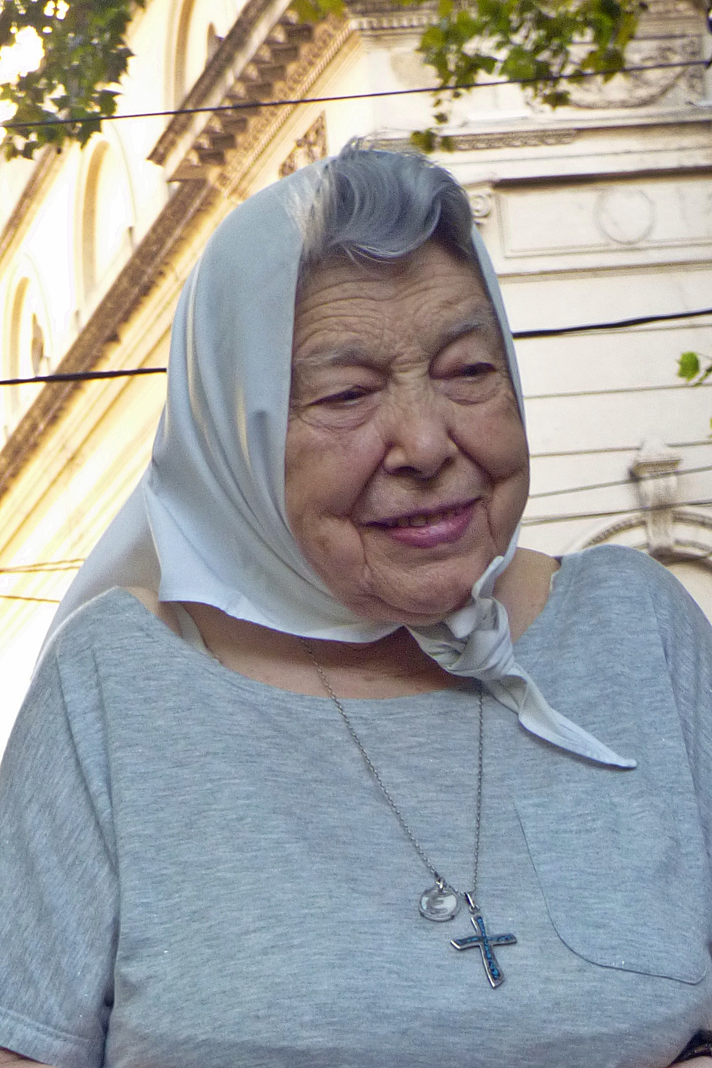 Chiche Massa, marcha del 26 de enero de 2017